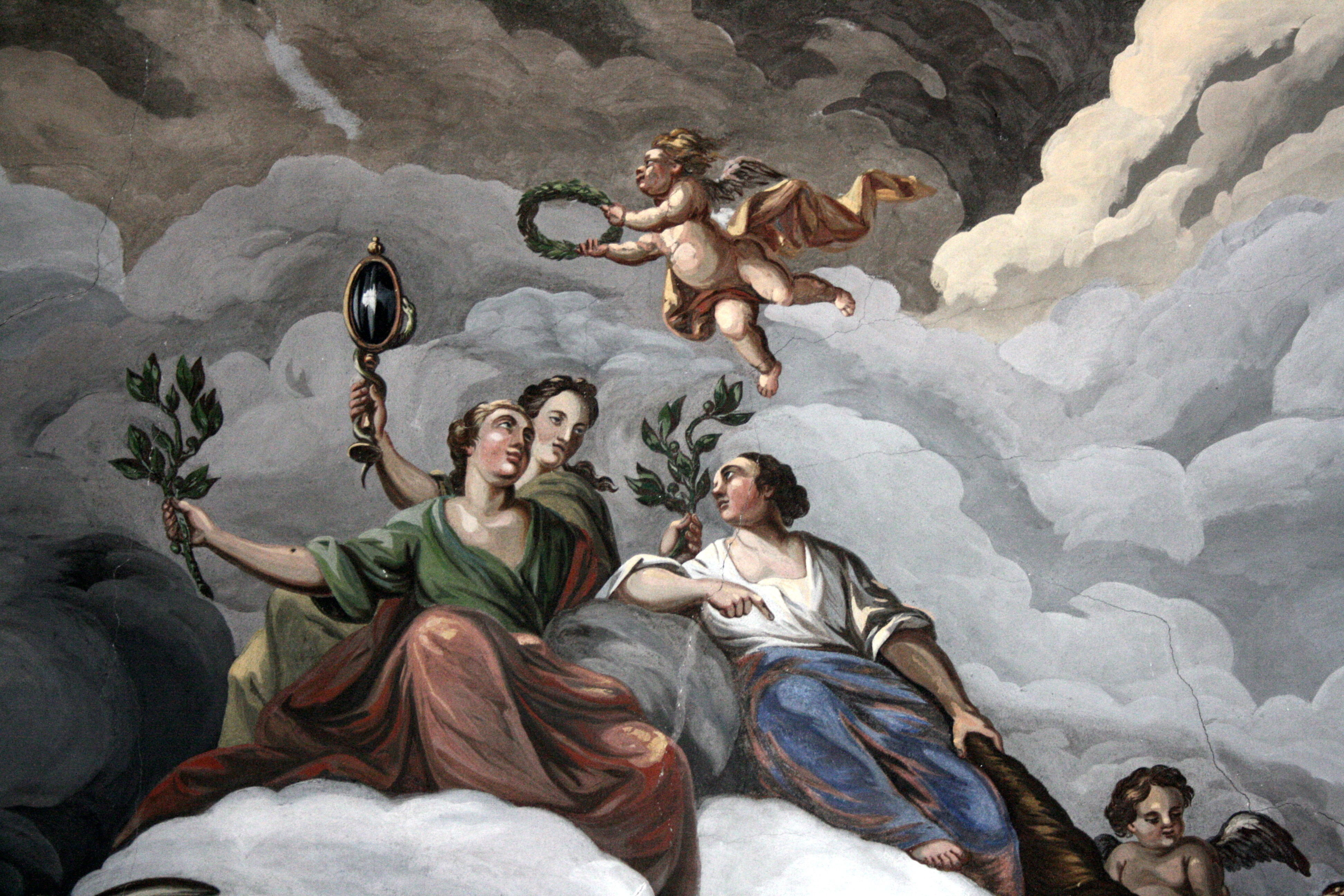 Figures de Pomone et Cérès.